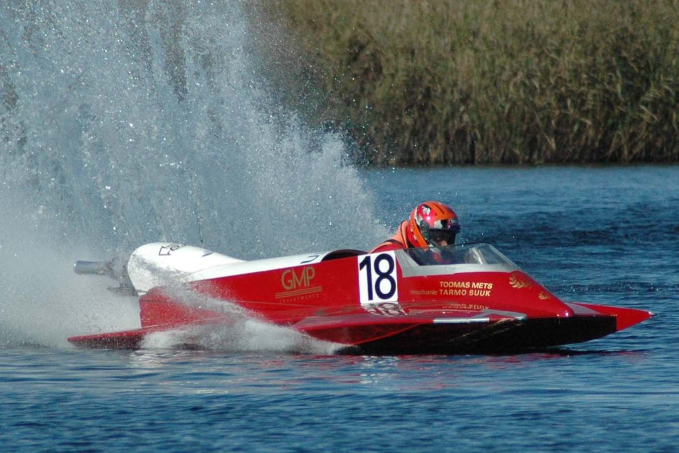 Maailmameister veemotos Toomas Mets